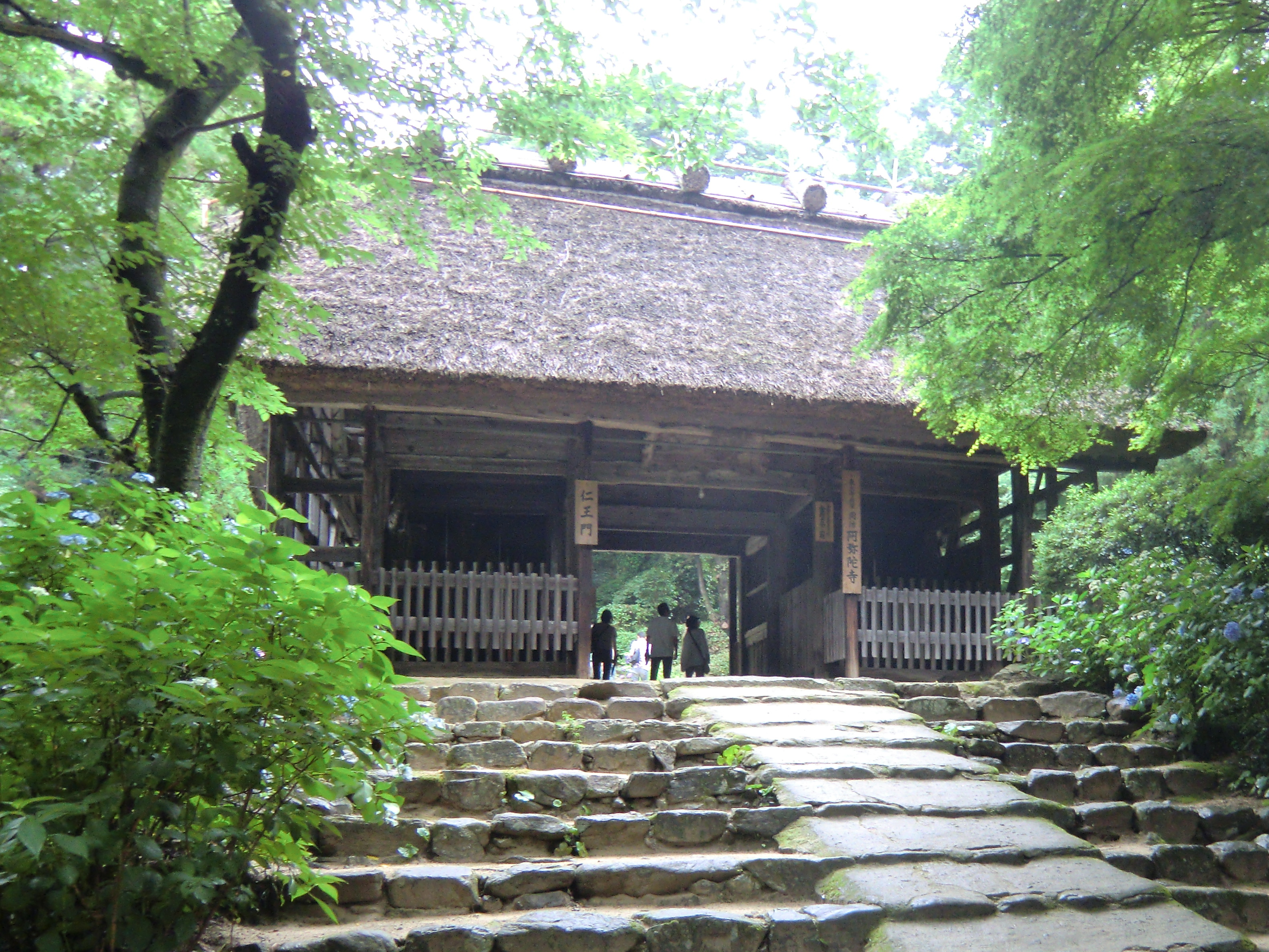 周防阿弥陀寺の山門